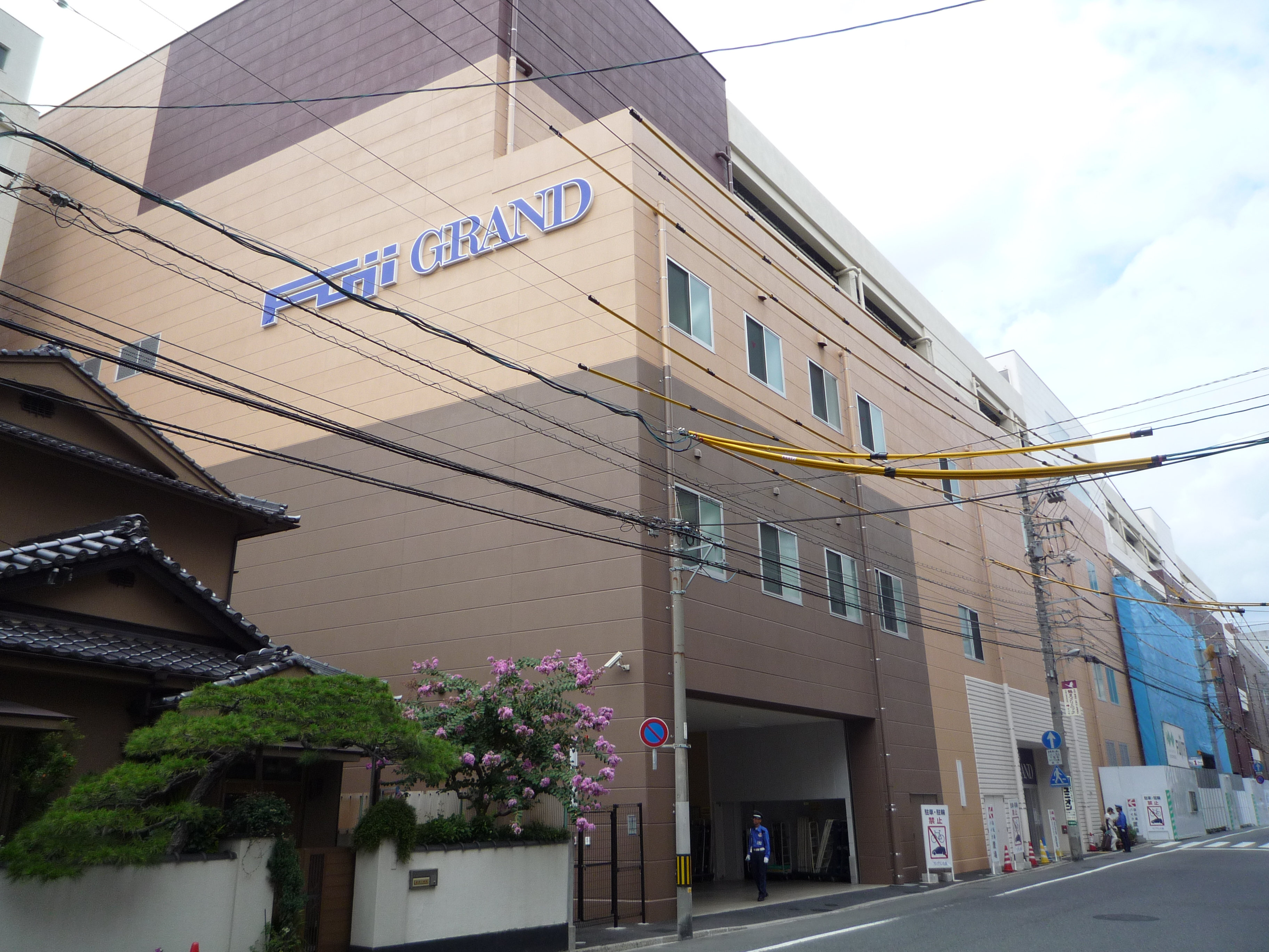 フジグラン広島